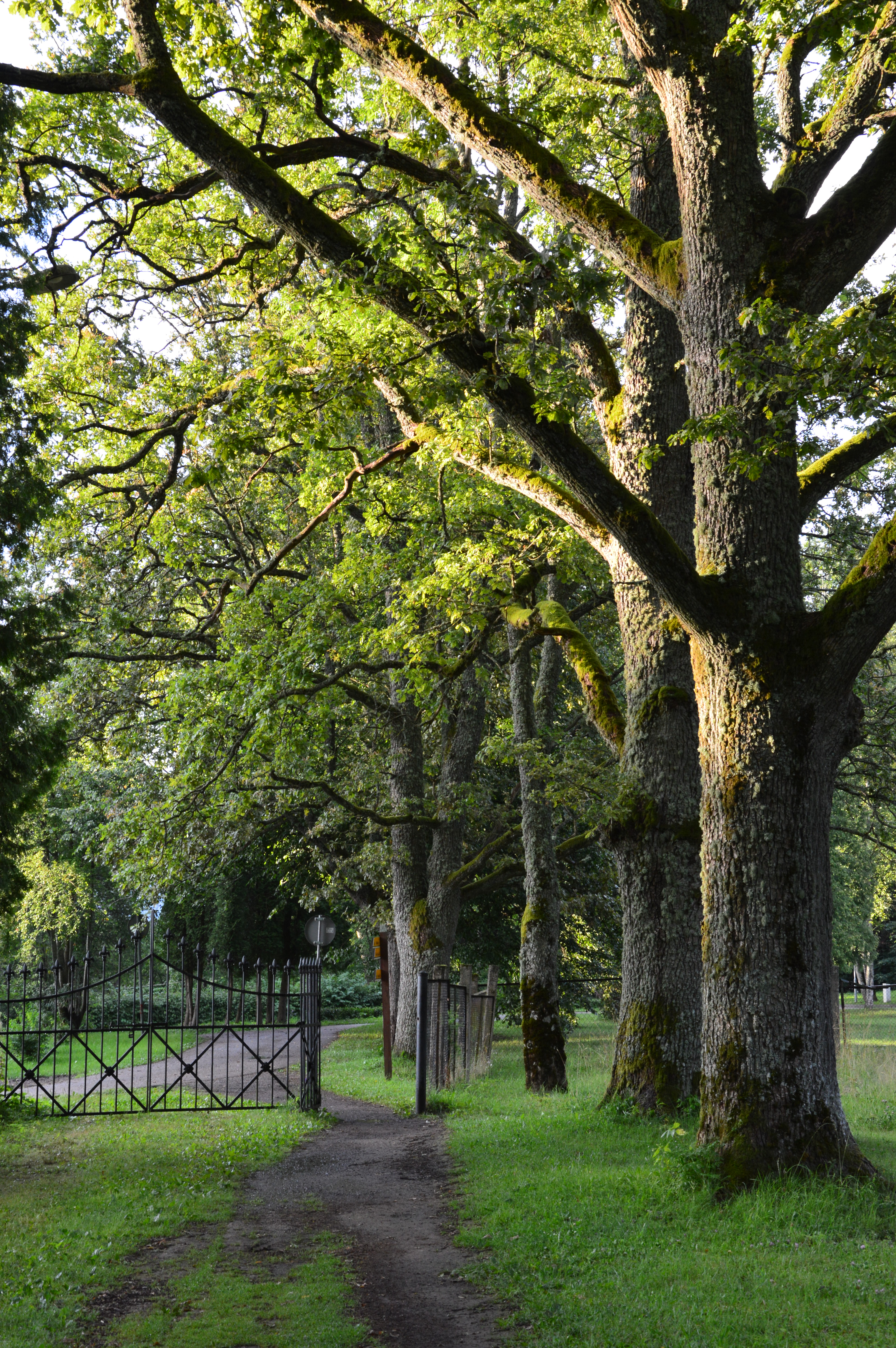 Krimulda mõisa park